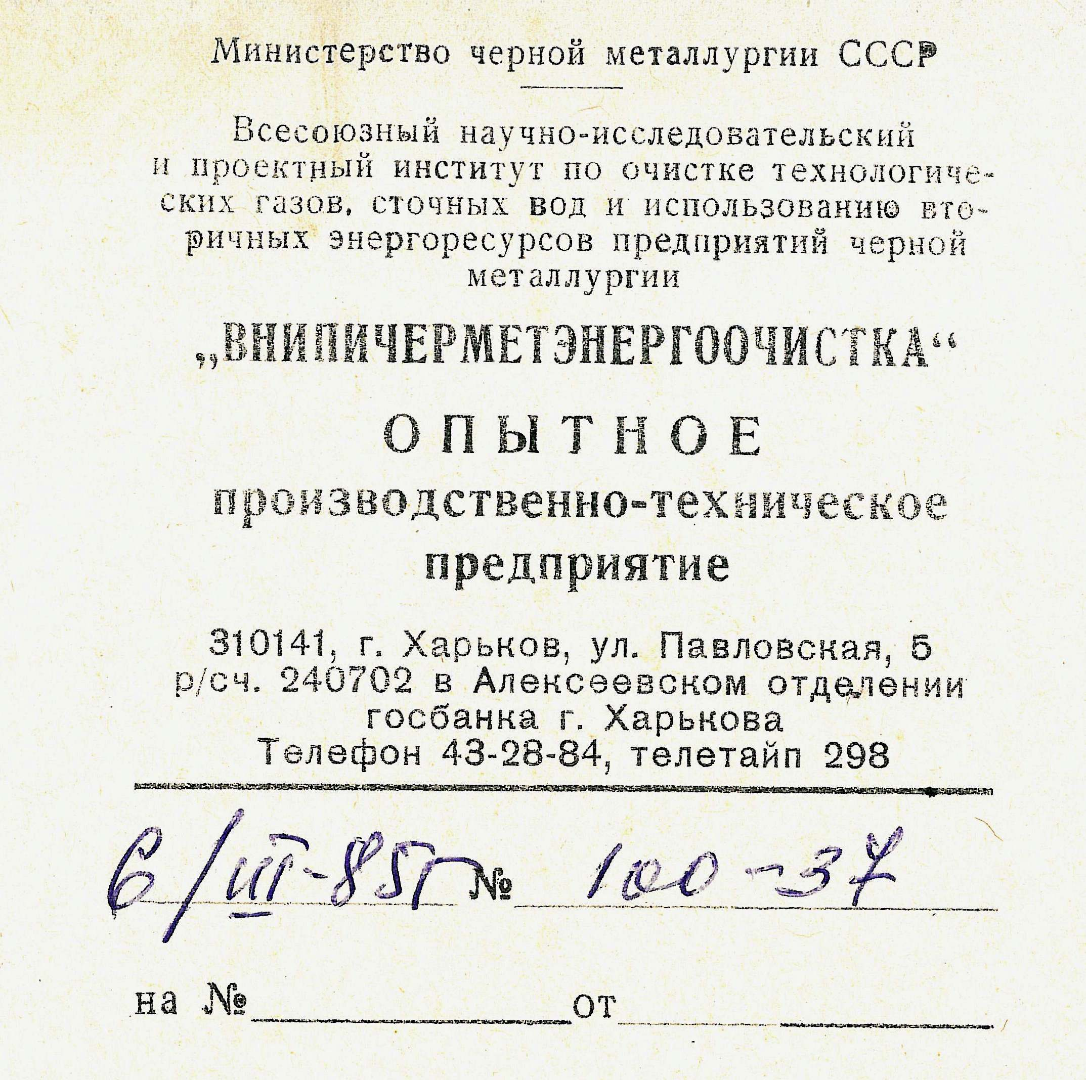 Внипичерметэнергоочистка (впоследствии Энергосталь), Харьков, Министерство чёрной металлургии СССР. Угловой штамп.